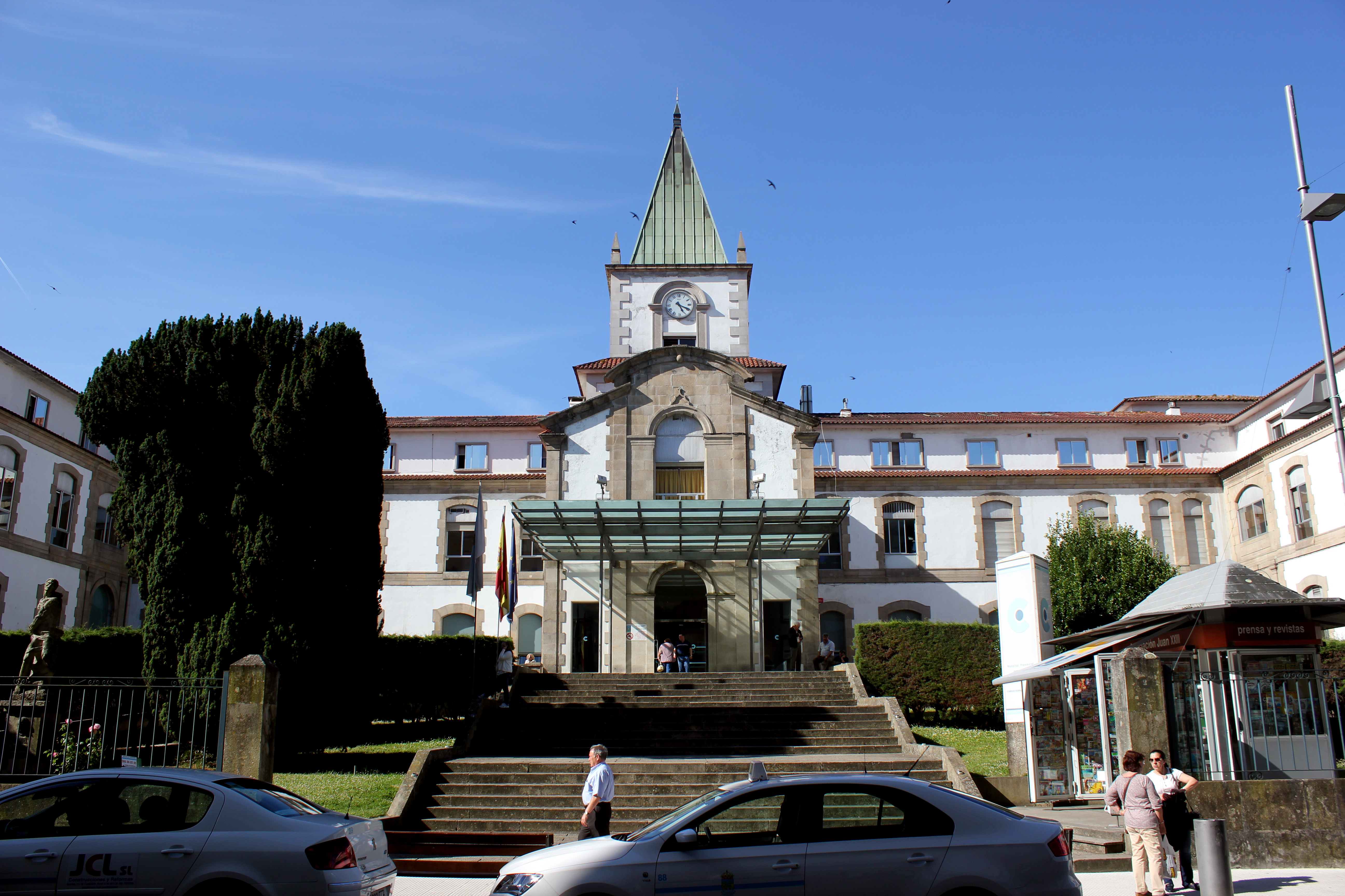 Hospital provincial Pontevedra Pontevedra capital